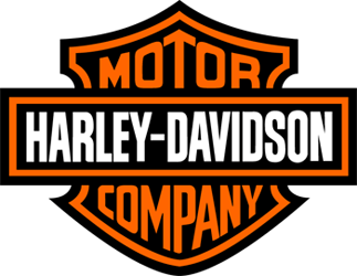 Harley Davidson (logo)